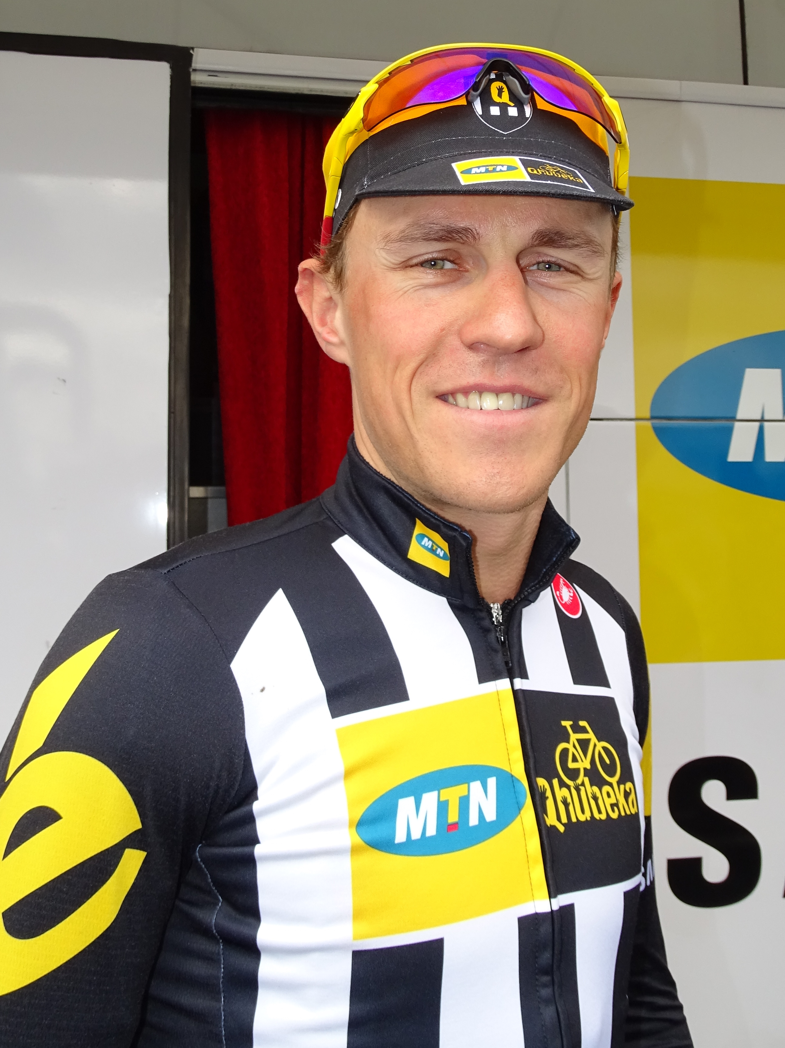 Reportage réalisé le mardi 31 mars à l'occasion de du départ de la première étape des Trois jours de La Panne 2015 à La Panne, Belgique.